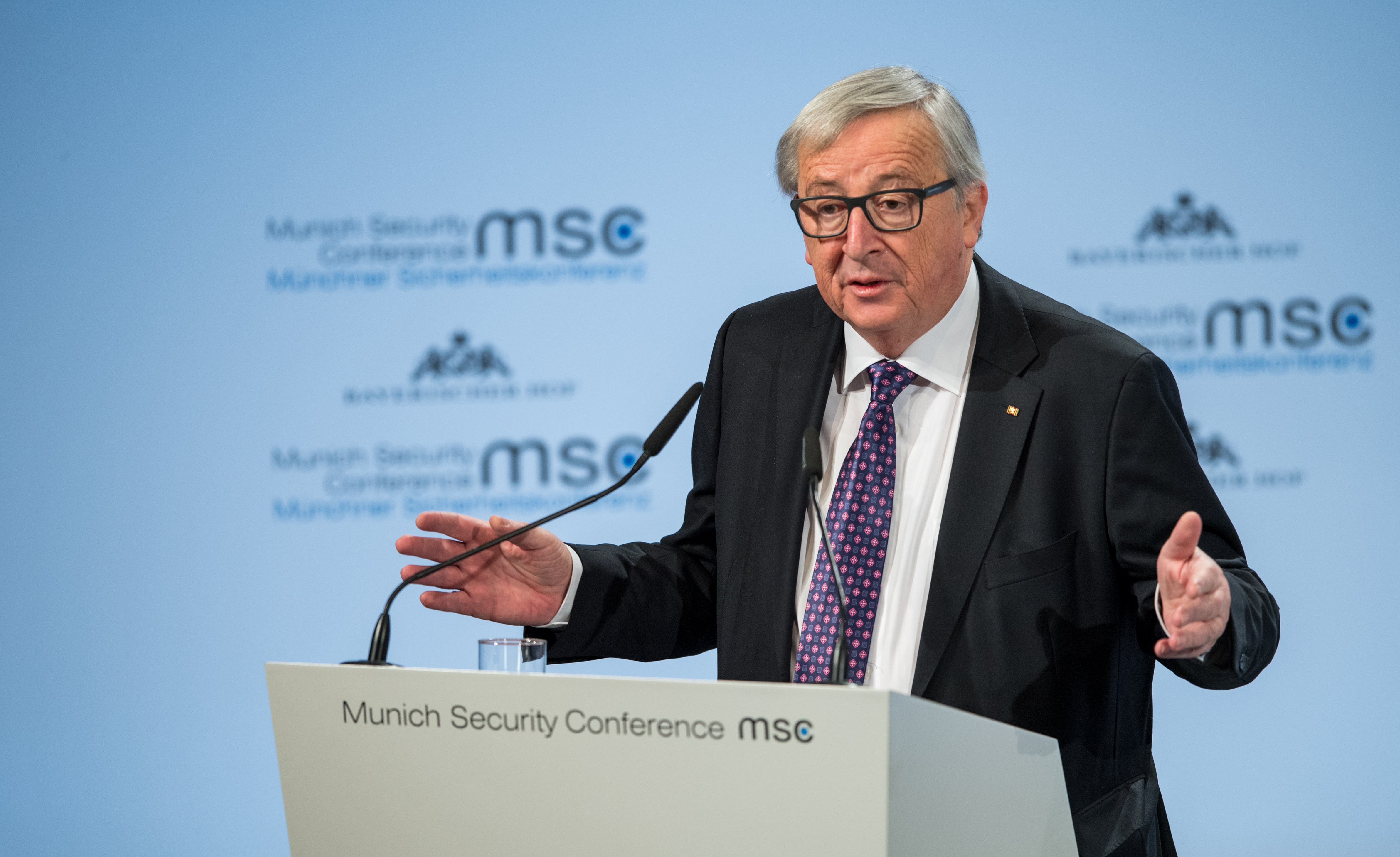 Jean-Claude Juncker während der Münchener Sicherheitskonferenz 2018